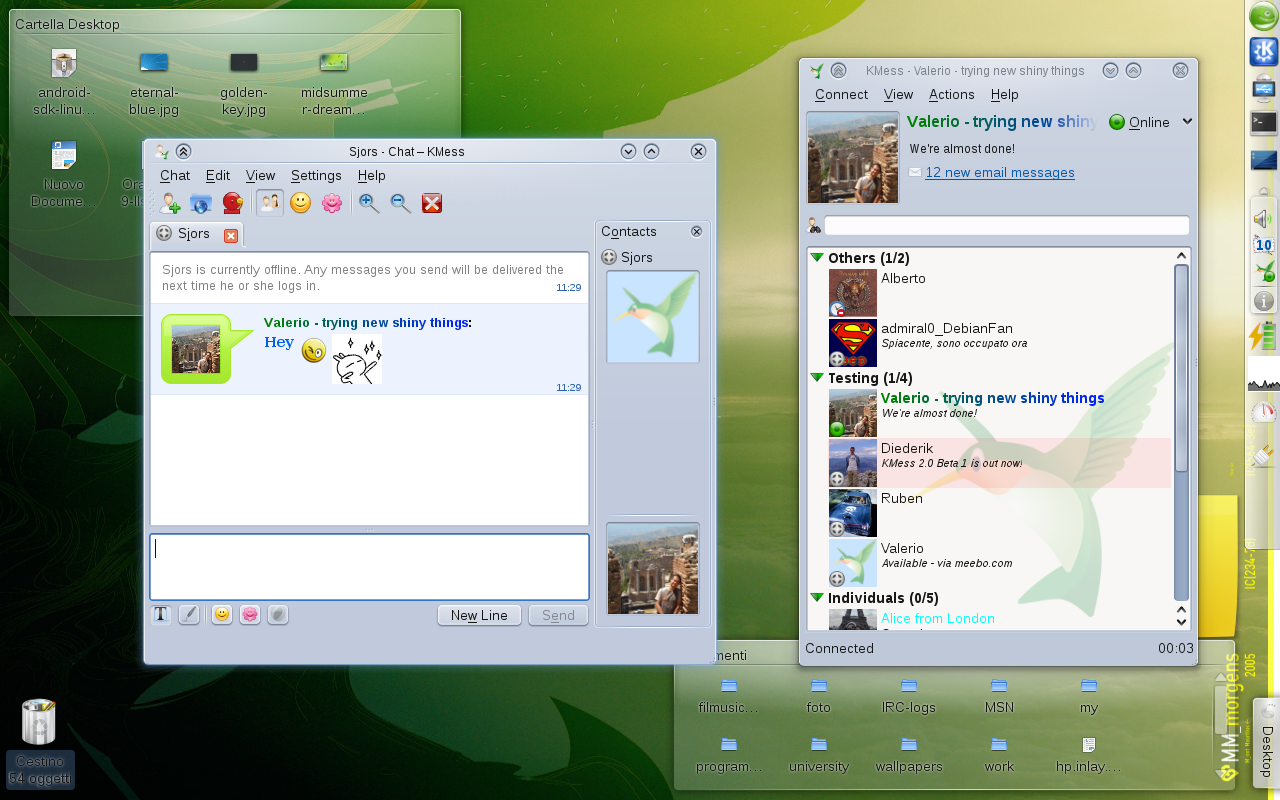 kde 4.3 i kmess